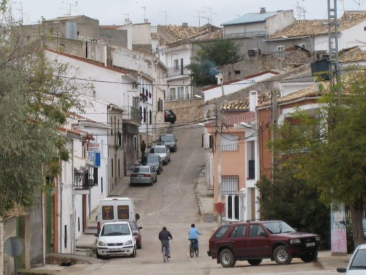 La calle Convento, con su cuesta empinada.